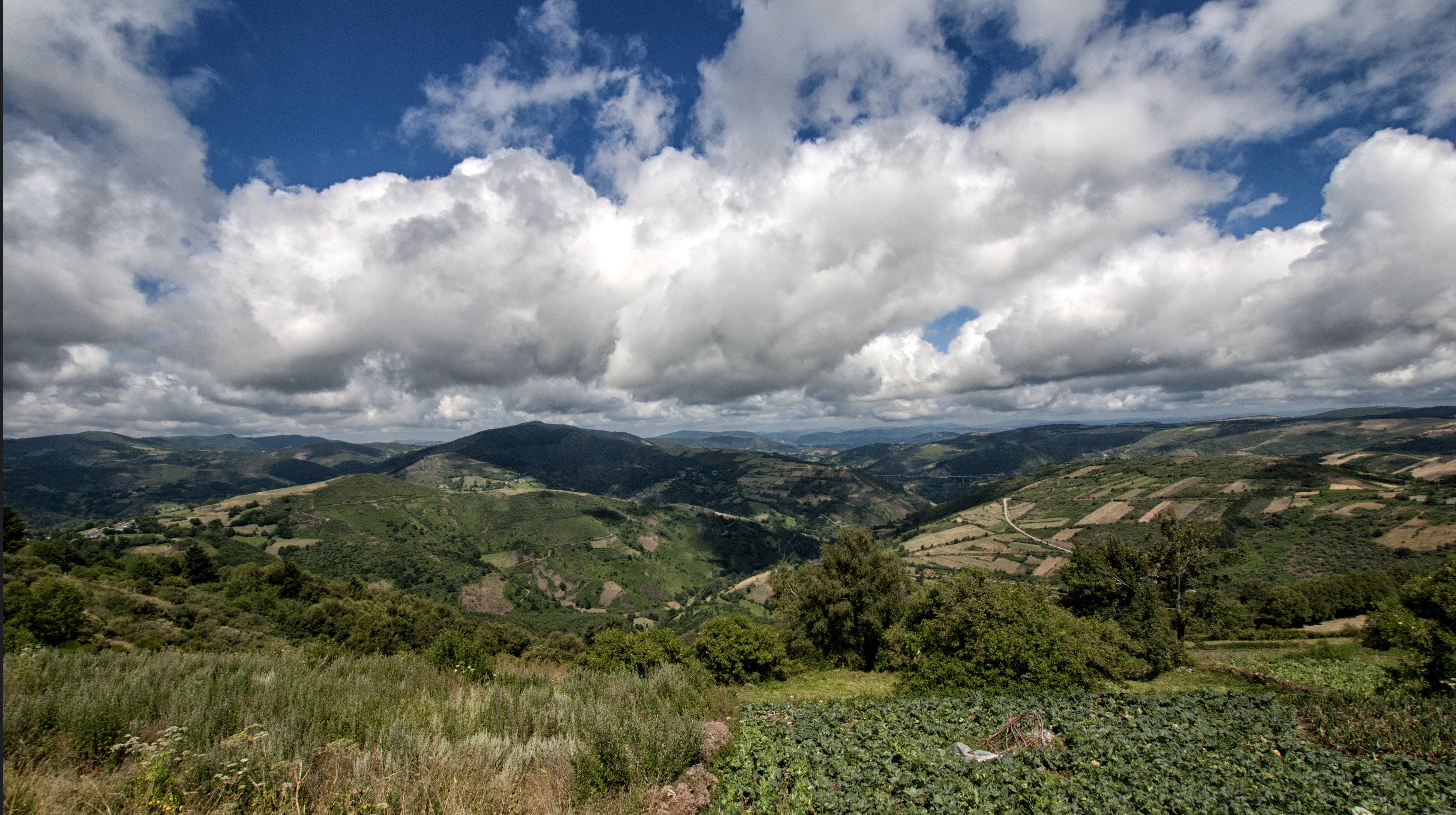 Para el reto 39 de la Familia Fotera. Nubes en el Alto del Poio en el Camino de Santiago.// Clouds from the Poio's Peak in Saint James's way.